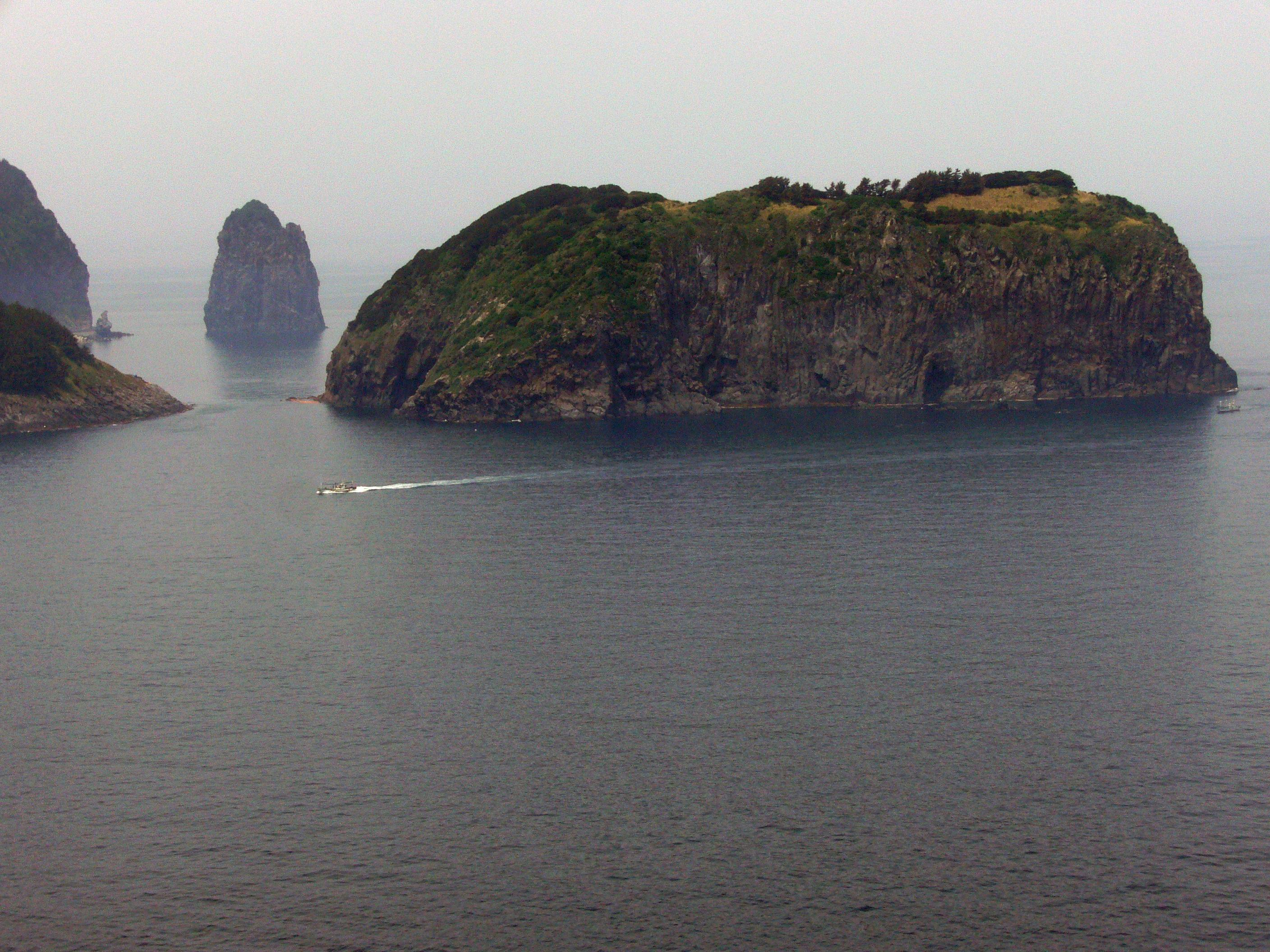 チュクドから見る観音島